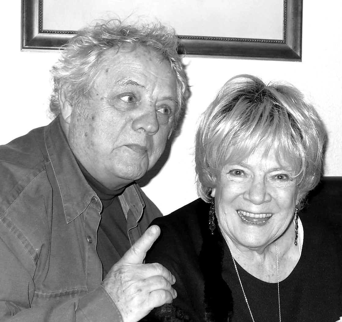 z tradičního setkání s přáteli na Štědrý den